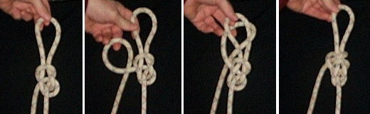 nœud d'arabesque + clef